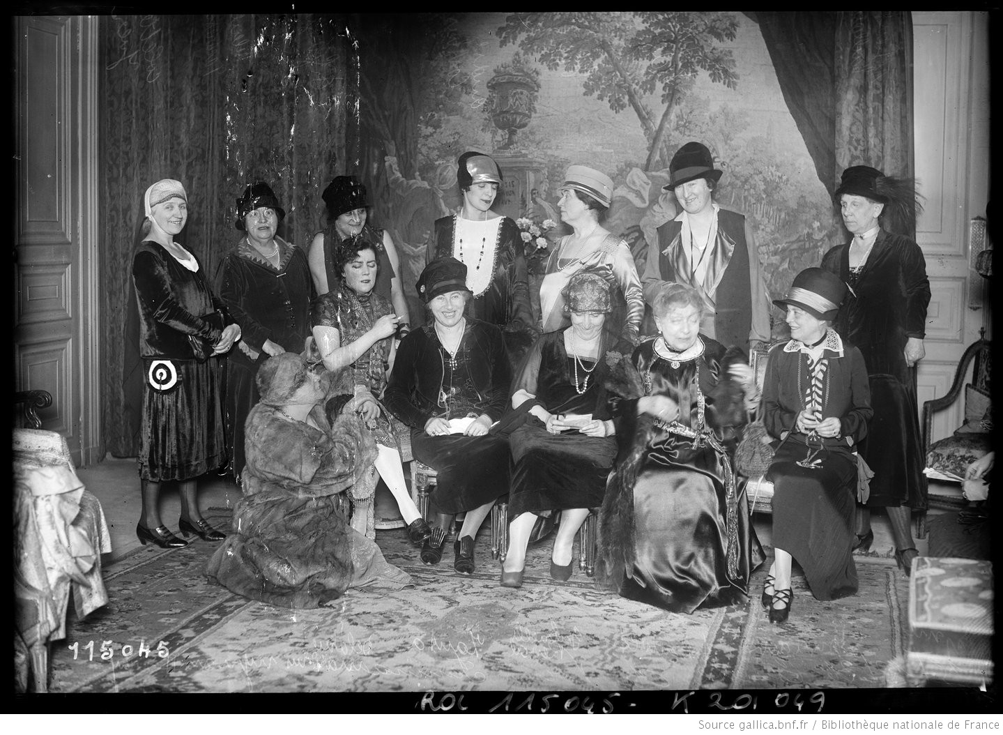 Titre : 15/12/26, comité du prix Fémina [de droite à gauche assises,] Mmes E. Duclaux, A. Daudet, Gabrielle Réval, Zanta, Delarue-Mardrus, Myriam Harry , [debout] Saint-René Taillandier, Judith Cladel, Jean Dornis, André Corthis, [?], Hélène Vacaresco, Colette Yver : [photographie de presse] / [Agence Rol] Auteur : Agence Rol. Agence photographique Ne voir que les résultats de cet auteur Date d'édition : 1926 Sujets Cladel, Judith (1873-1958) Delarue-Mardrus, Lucie (1874-1945) Daudet, Julia (1844-1940) Réval, Gabrielle (1869-1938) Harry , Myriam (1869-1958) Zanta, Léontine (1872-1942) Dornis, Jean (1870-1948) Corthis, André (1882-1952) Vacaresco, Hélène (1864-1947) Yver, Colette (1874-1953) Prix Femina Paris (France) Portraits collectifs -- 1914-1945 Type : image fixe Type : image Type : still image Type : photographie Type : photograph Langue : français Format : 1 photogr. nég. sur verre ; 13 x 18 cm (sup.) Format : image/jpeg Format : Nombre total de vues : 1 Description : Référence bibliographique : Rol, 115045 Description : Appartient à l’ensemble documentaire : Pho20Rol Description : Image de presse Droits : domaine public Droits : public domain Identifiant : ark:/12148/btv1b53171887g Source : Bibliothèque nationale de France, département Estampes et photographie, EI-13 (1382) Couverture : 15 décembre 1926 Notice du catalogue : Provenance : Bibliothèque nationale de France Date de mise en ligne : 01/07/2018